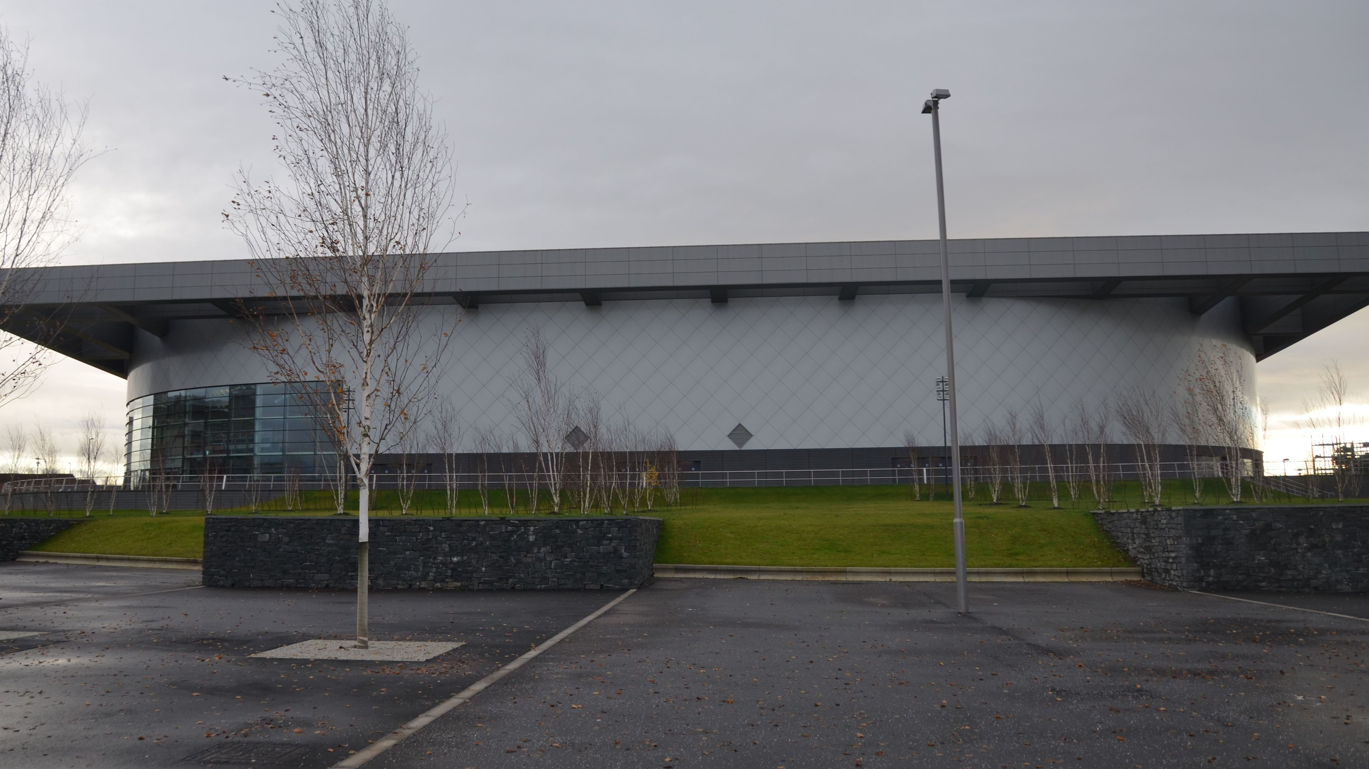 Sir Chris Hoy Velodrome, Bahnrad-Weltcup 2012